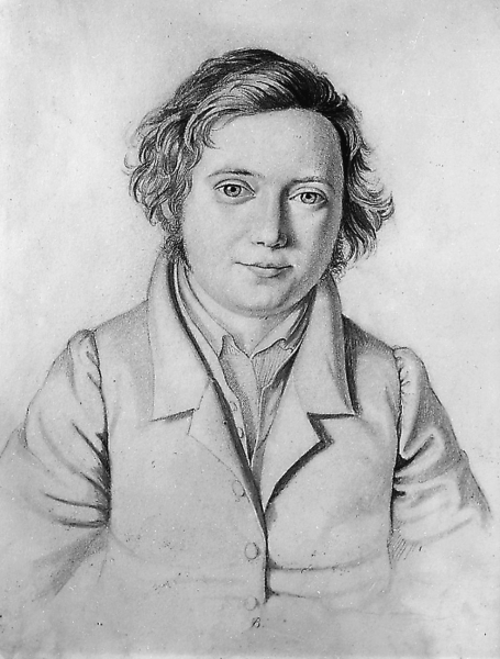 Georg Klett (1797–1855), Heilbronner Stadtarzt, führte 1828 die erste dokumentierte erfolgreiche Bluttransfusion in Deutschland durch